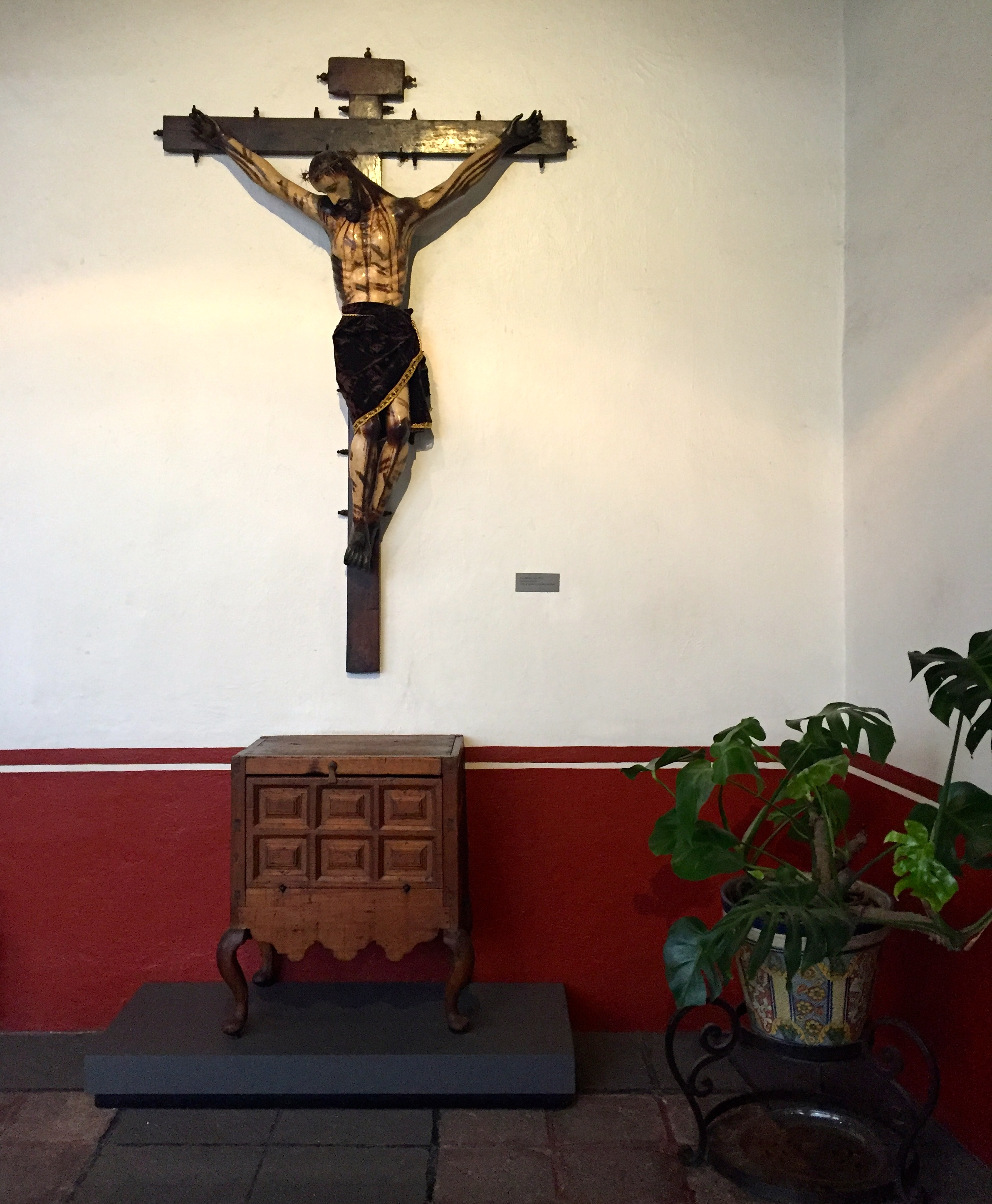 En la decoración colonial podemos apreciar que el uso de imágenes religiosas era muy predominante. Ésta foto muestra un Cristo crucificado en uno de los pasillos del segundo piso de la Casa del Risco.